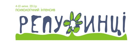 База відпочинку студентів Буковинського державного медичного університету в с. Репуженцы, Заставнівського району